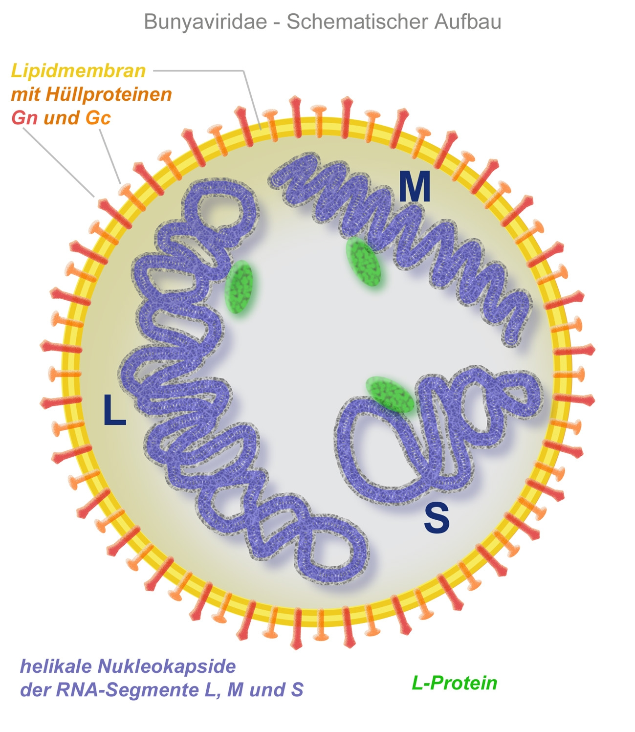 Bunyaviridae, schematischer Aufbau